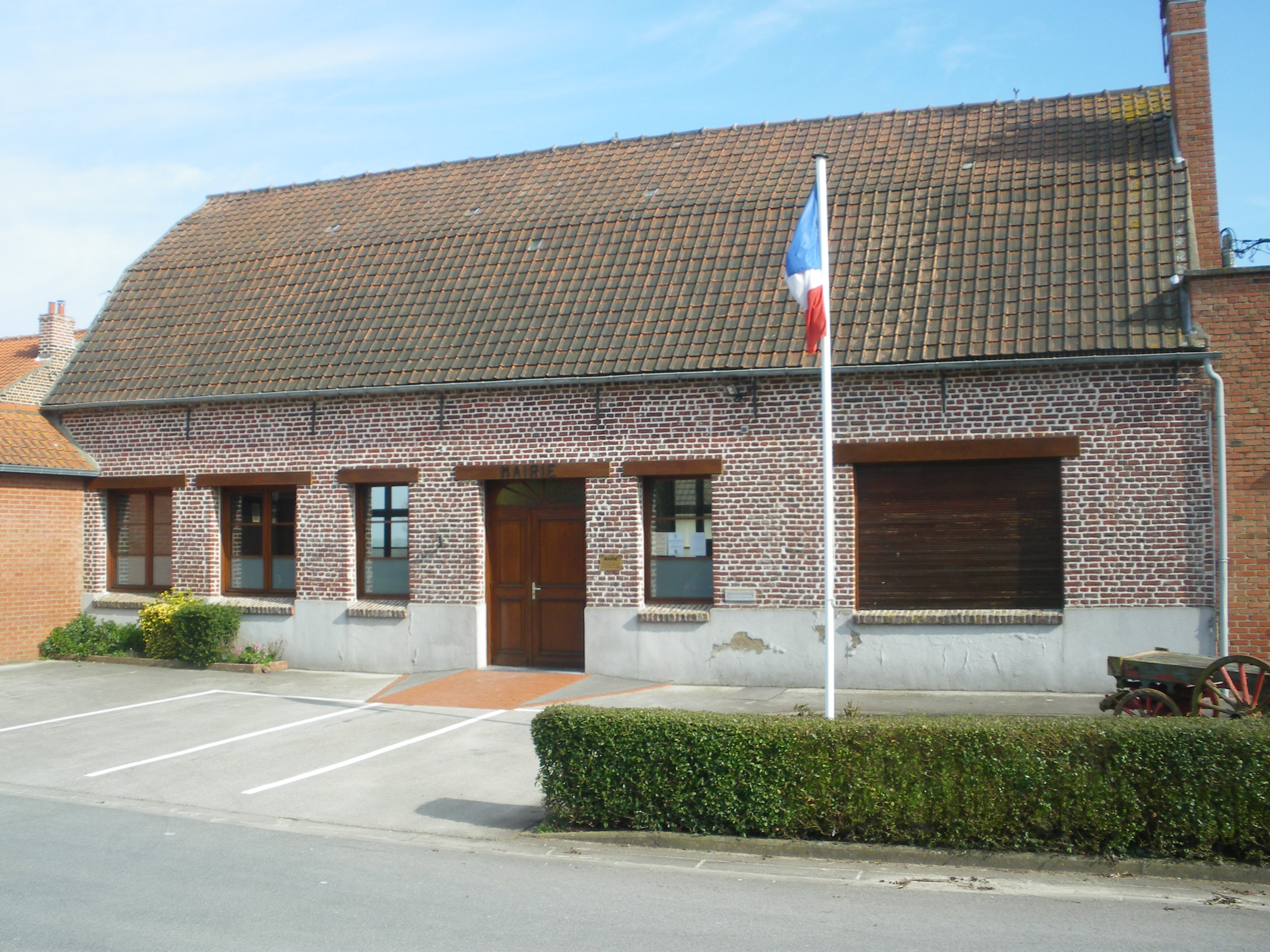 Vue de la mairie d'Eringhem.